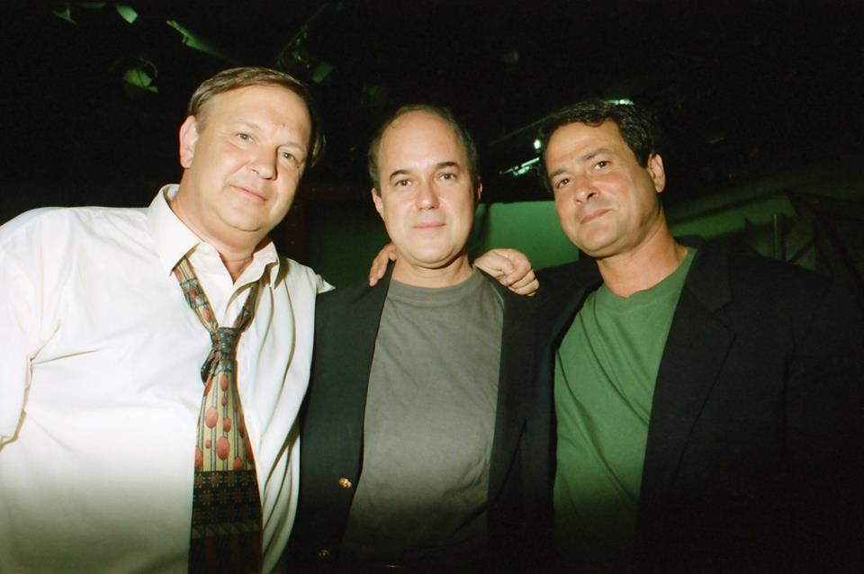 חברים צמודים מאז כיתה ב' דודו טופז מני פאר יגאל שילון